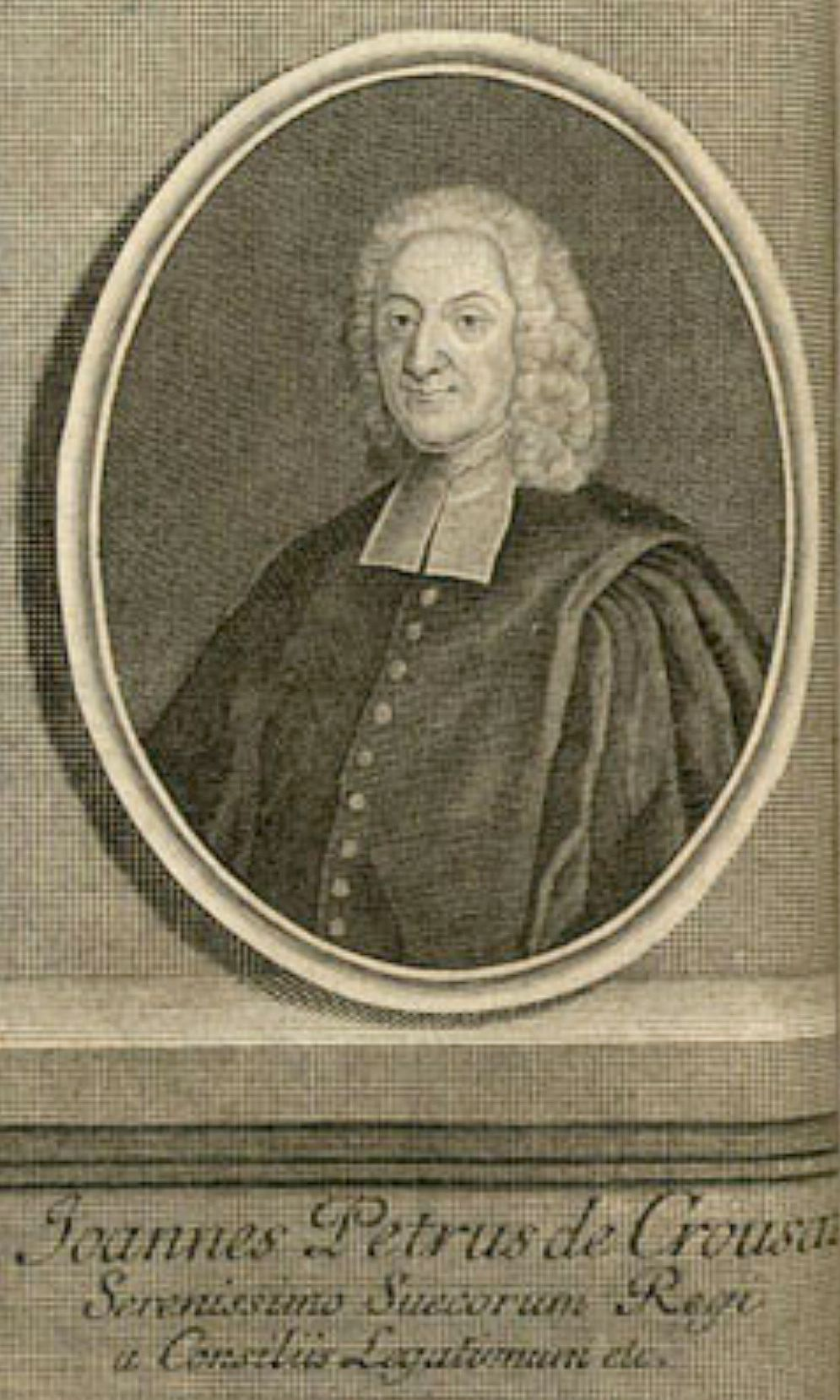 Jean-Pierre de Crousaz (* 13. April 1663 in Lausanne (Schweiz); † 22. Februar 1750 ebenda), schweizerischer Professor und Philosoph